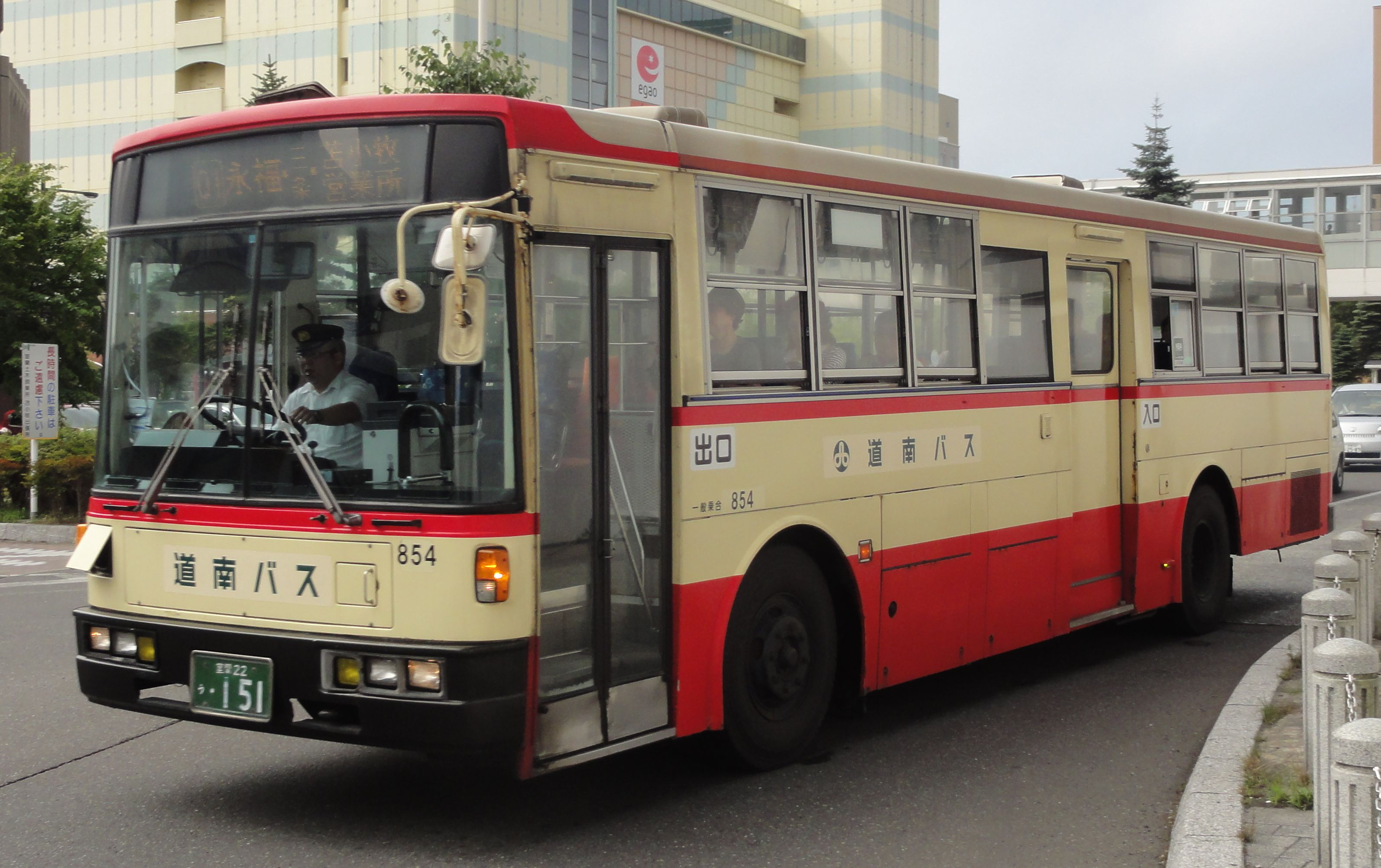 道南バス の路線バス車両